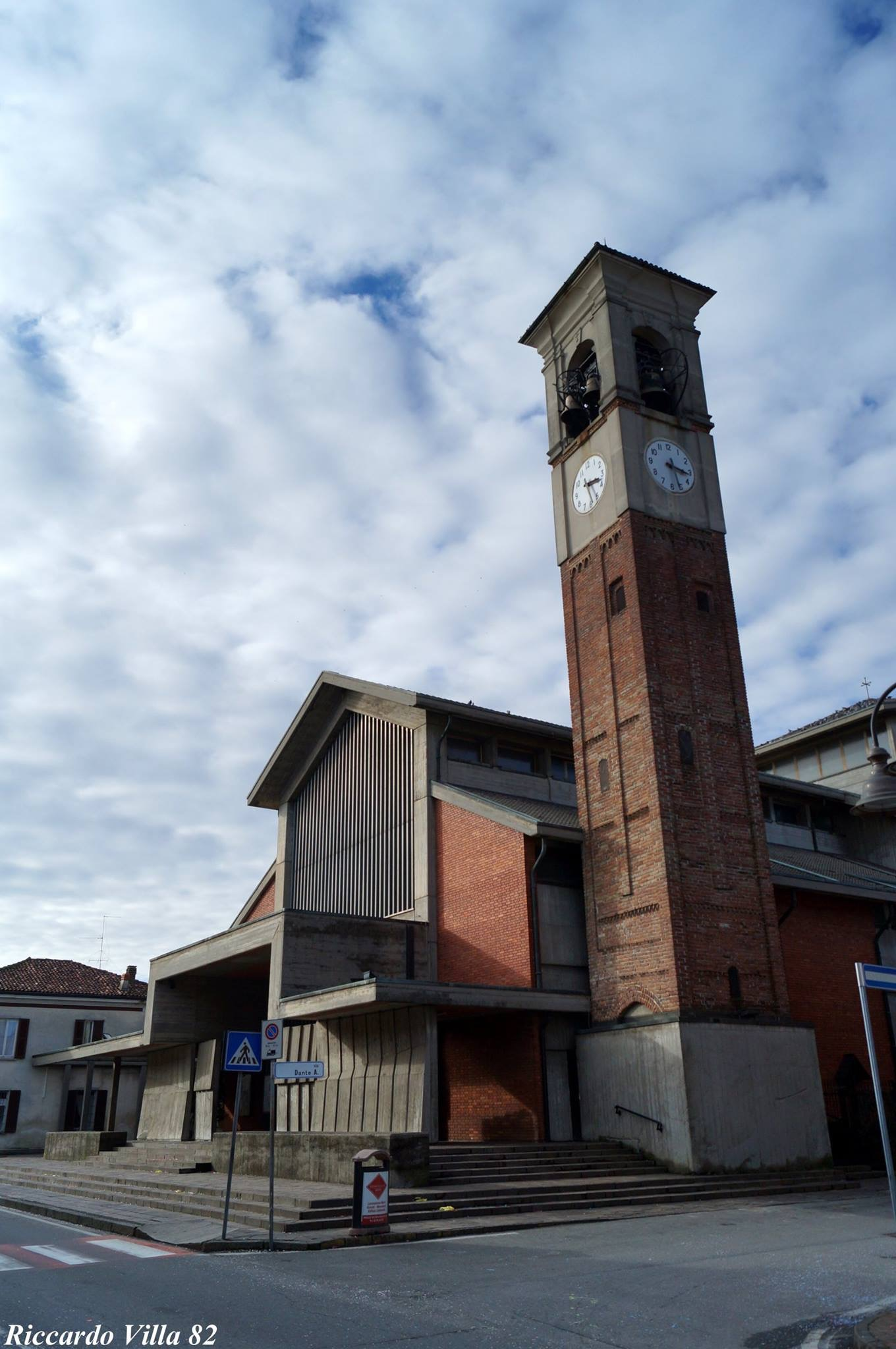 Chiesa parrocchiale dei Santi Quirico e Giulitta a Paullo